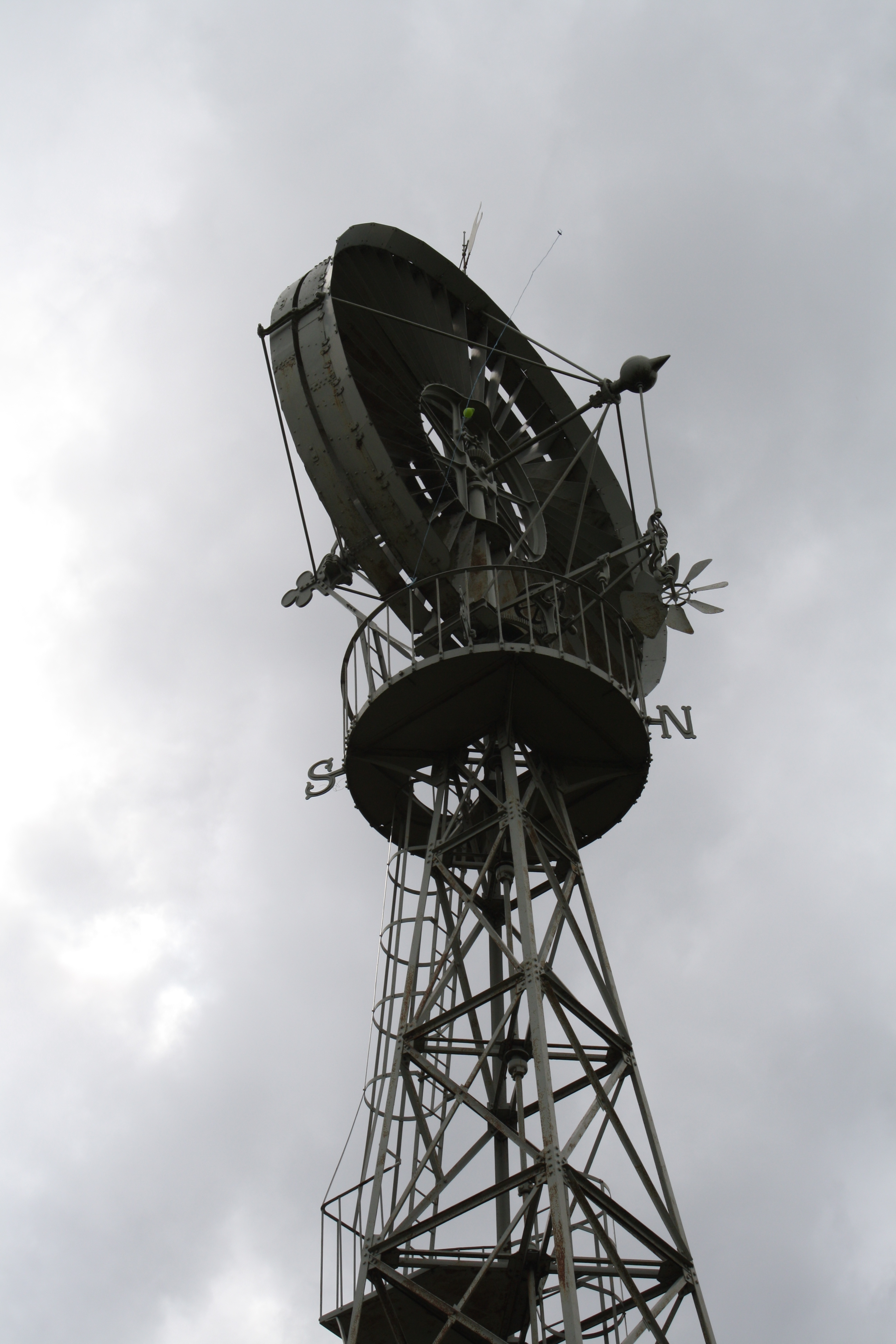 Éolienne de puisage n°3 de Ernest- Sylvain Bollée, 1901, à Souilly, département de la Meuse, en Lorraine, France.